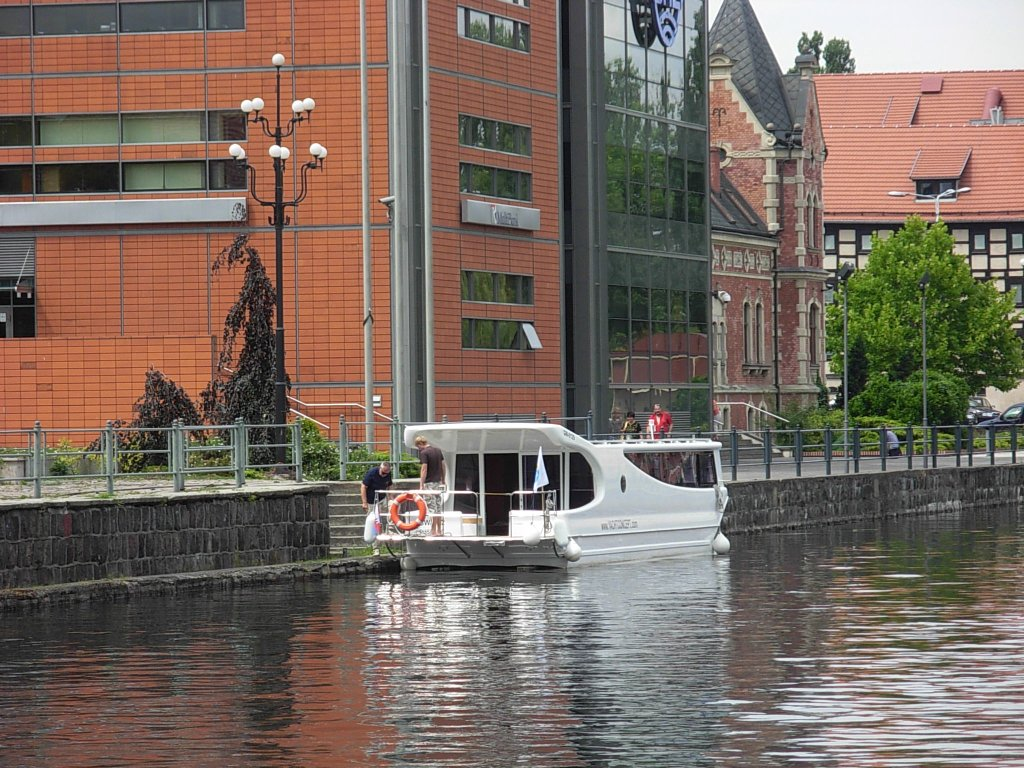 Tramwaj wodny w Bydgoszczy